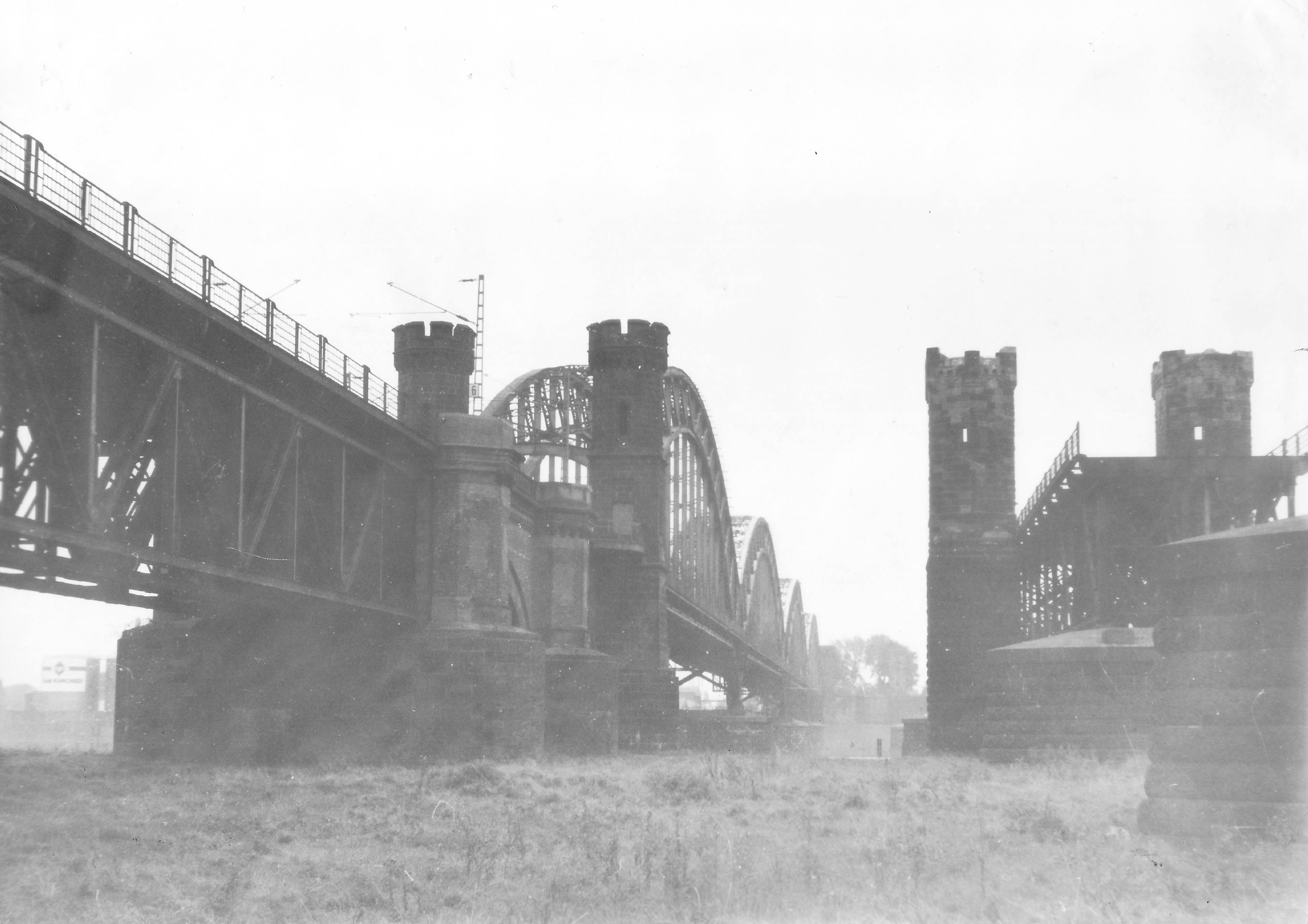 Düsseldorf-Hammer Eisenbahnbrücke Ende der 70er Jahre. Links die nördliche damals intakte Eisenbahnbrücke, rechts die Ruine der südlichen Brücke am Platz der heutigen Brücke